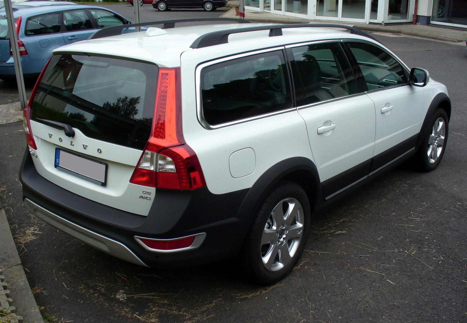 Volvo XC70